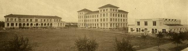 Vue d'ensemble de l'ecole polytechnique dans les années 30.